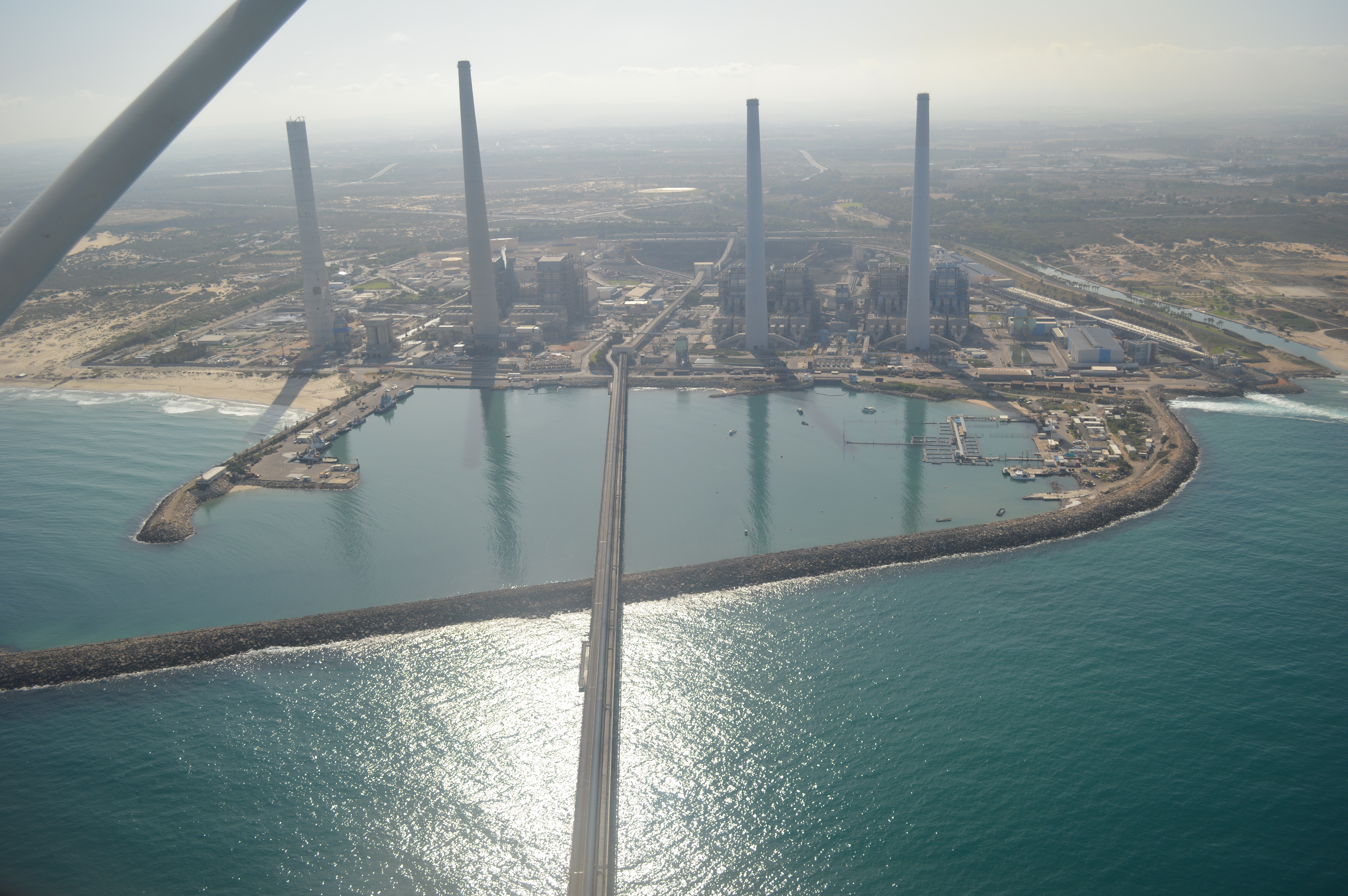 צילום אוויר של תחנת הכח אורות רבין